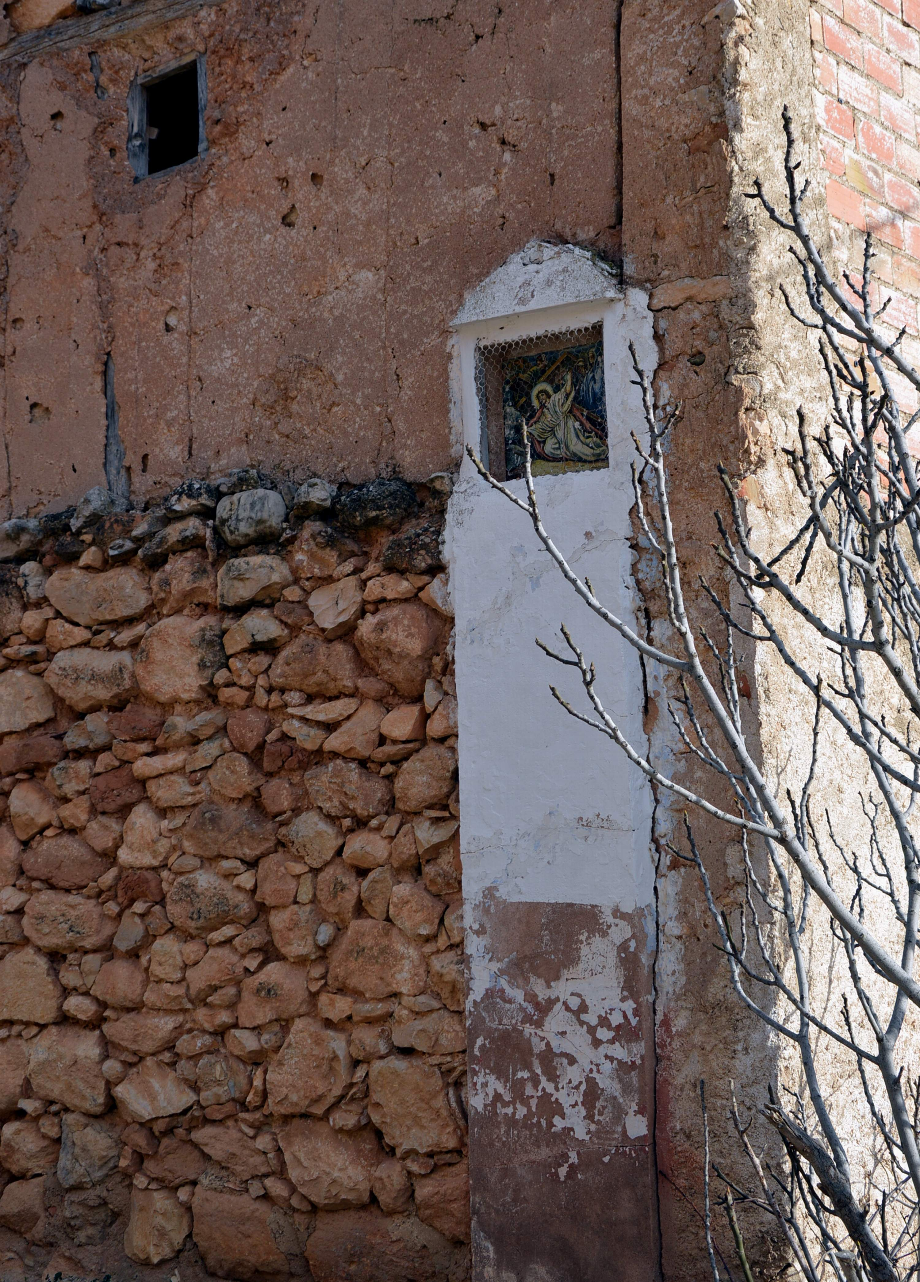 Estación VII del Viacrucis de Casasbajas (Valencia): Jesús cae por segunda vez.